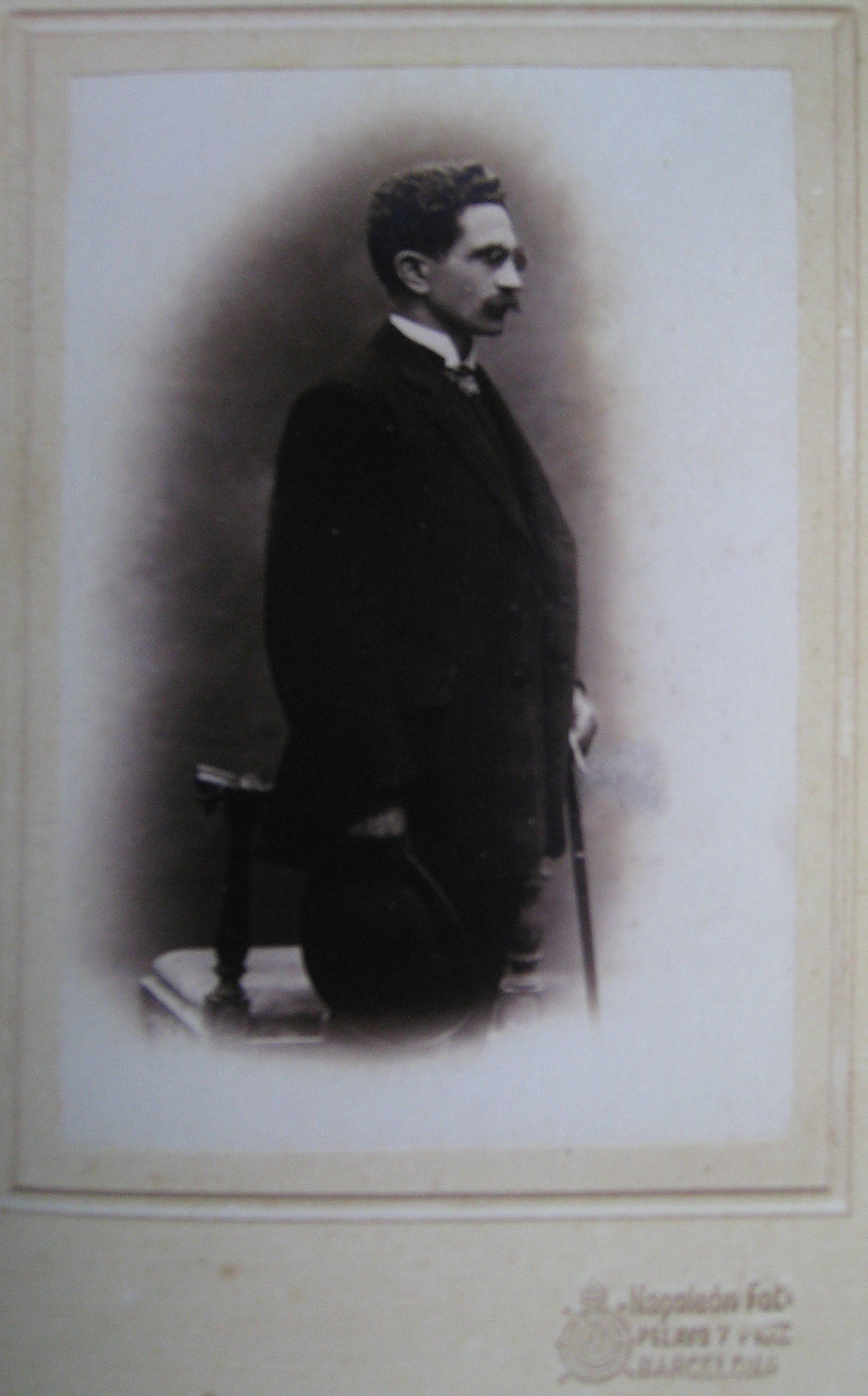 Retrat del polític Narcís Verdaguer i Callís (Vic, Osona 1863 - Barcelona 1918). Obra dels Fotògrafs Napoleon de 1905.